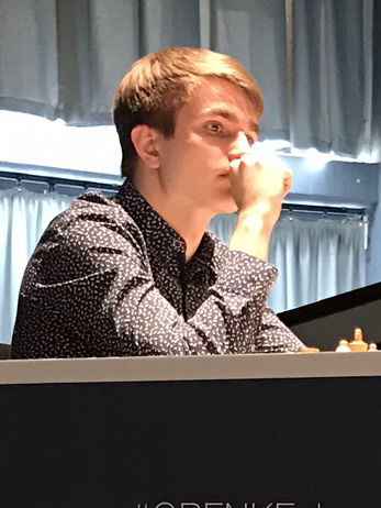 Alexey Sarana, Runde 9 der Grenke Chess Open 2019 in Karlsruhe.